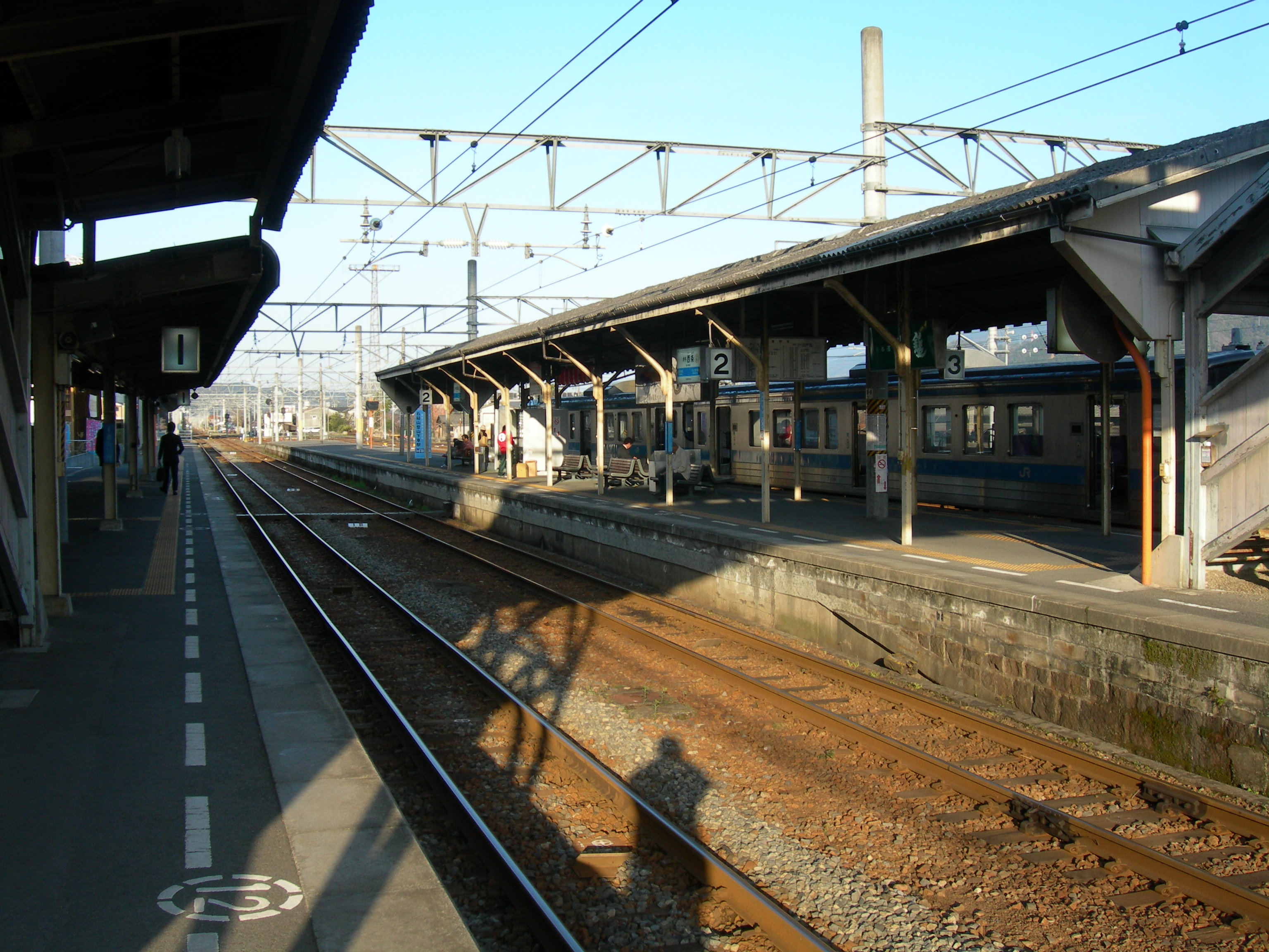 伊予西条駅プラットホーム